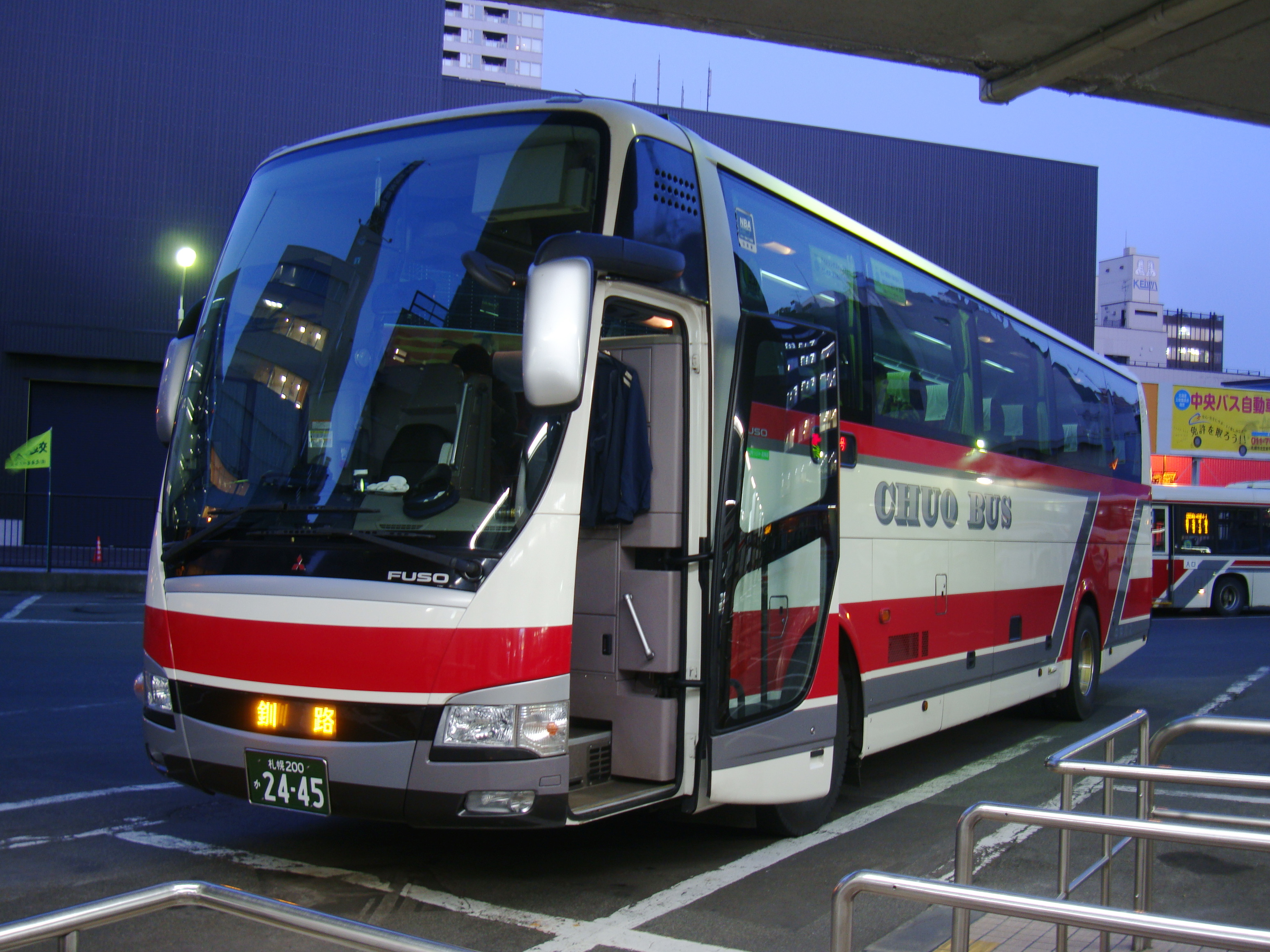 "Star Light Kushiro gō" Saporo to Kushiro